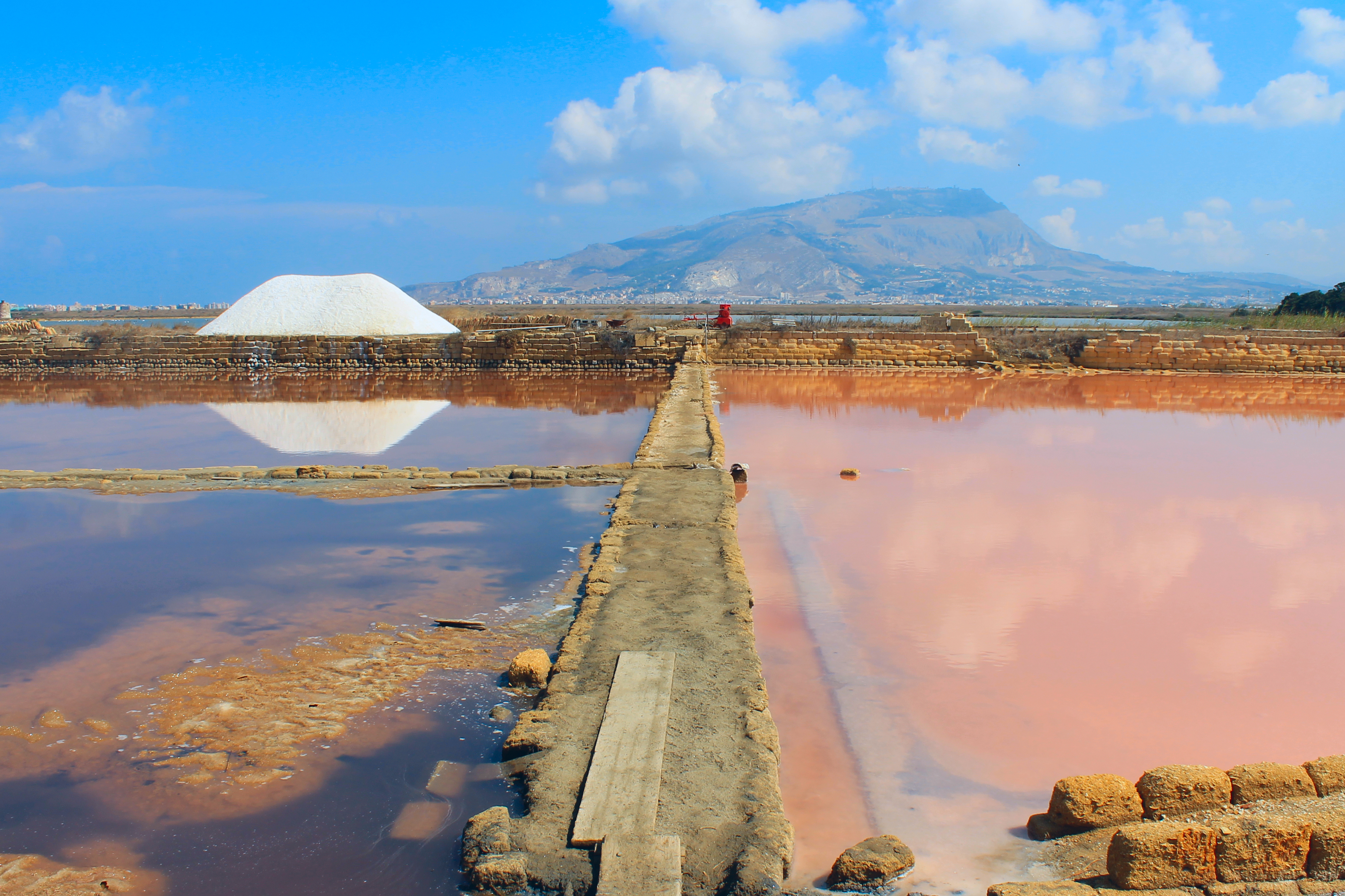 Saline di Trapani e Paceco This is a photo of a monument which is part of cultural heritage of Italy. The authorisation for taking photos of this object was provided by the World Wide Fund for Nature Italy.